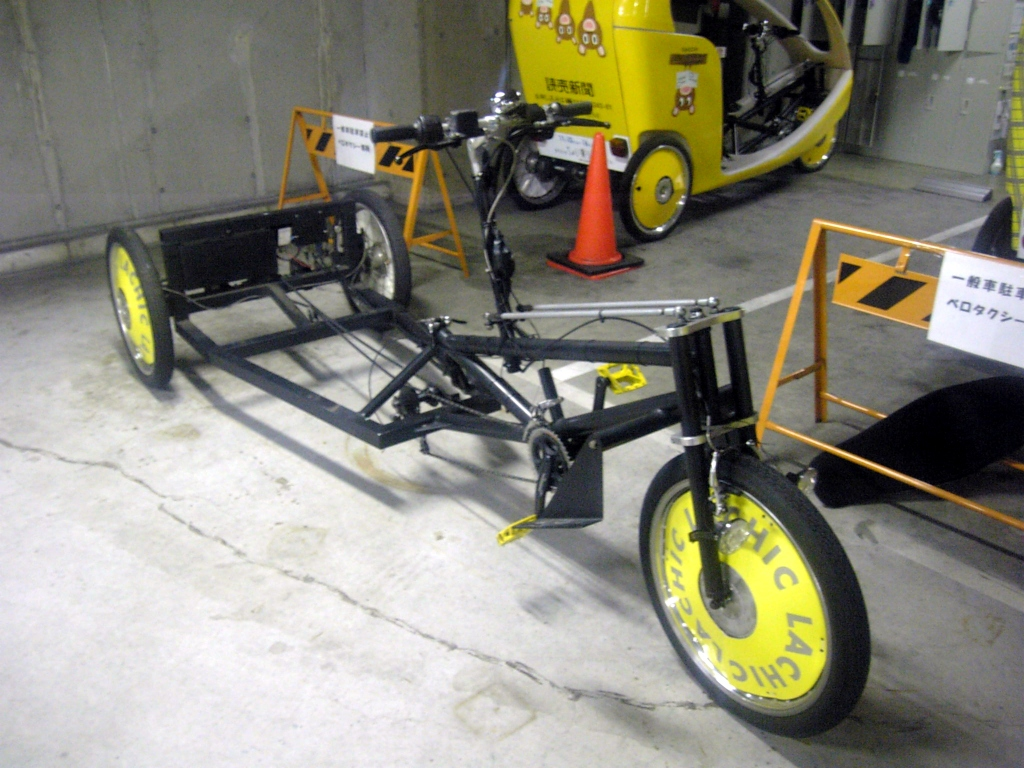 VELOTAXI Frame